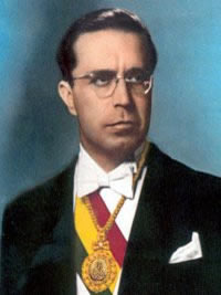 Víctor Paz Estenssoro, presidente de Bolivia (1952-1956, 1960-1964, 1985-1989)